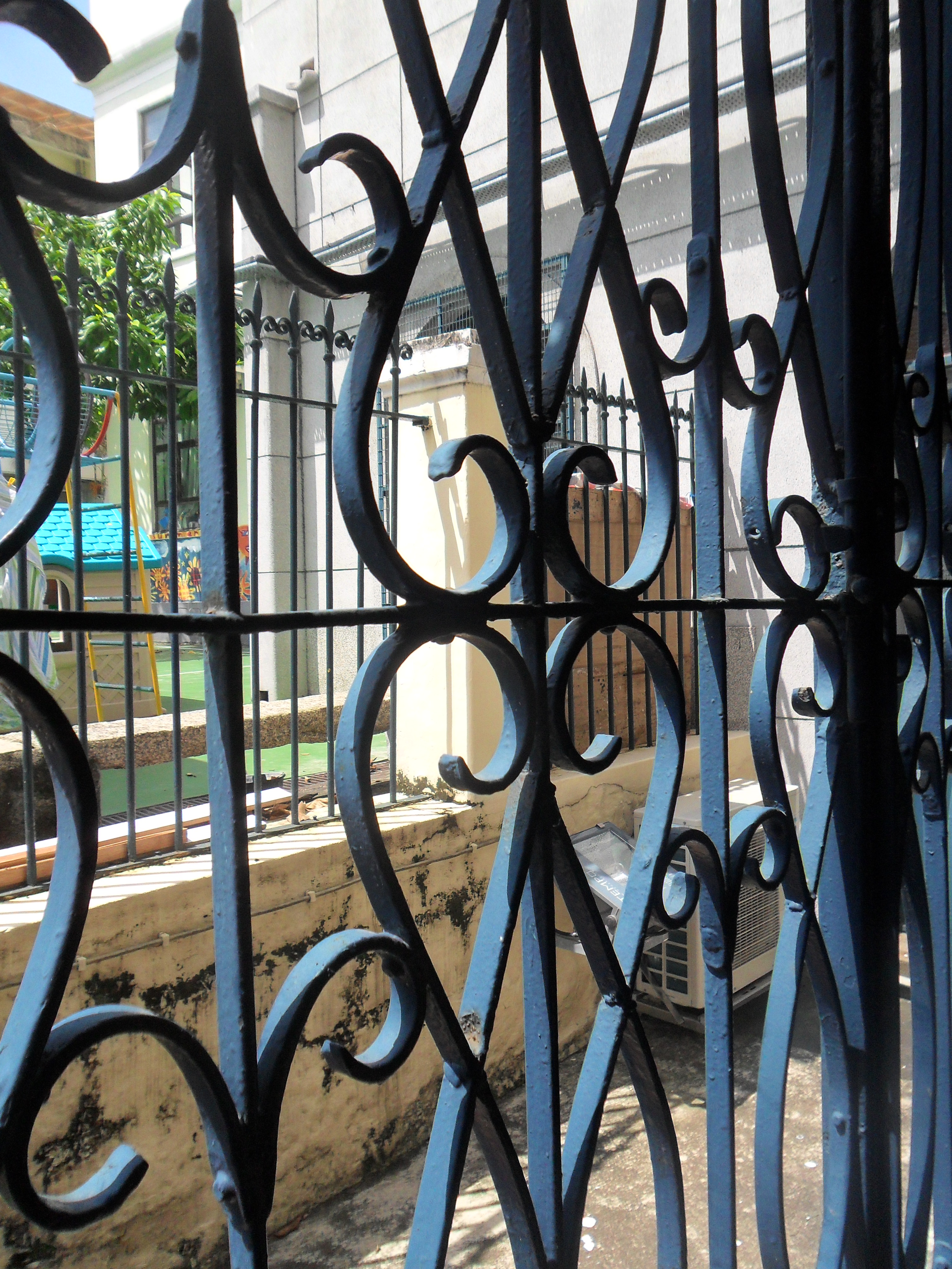 中文（香港）: 望德聖母堂, 澳門, 中國